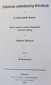 title page